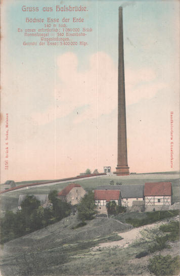 Halsbrücke, Schornstein